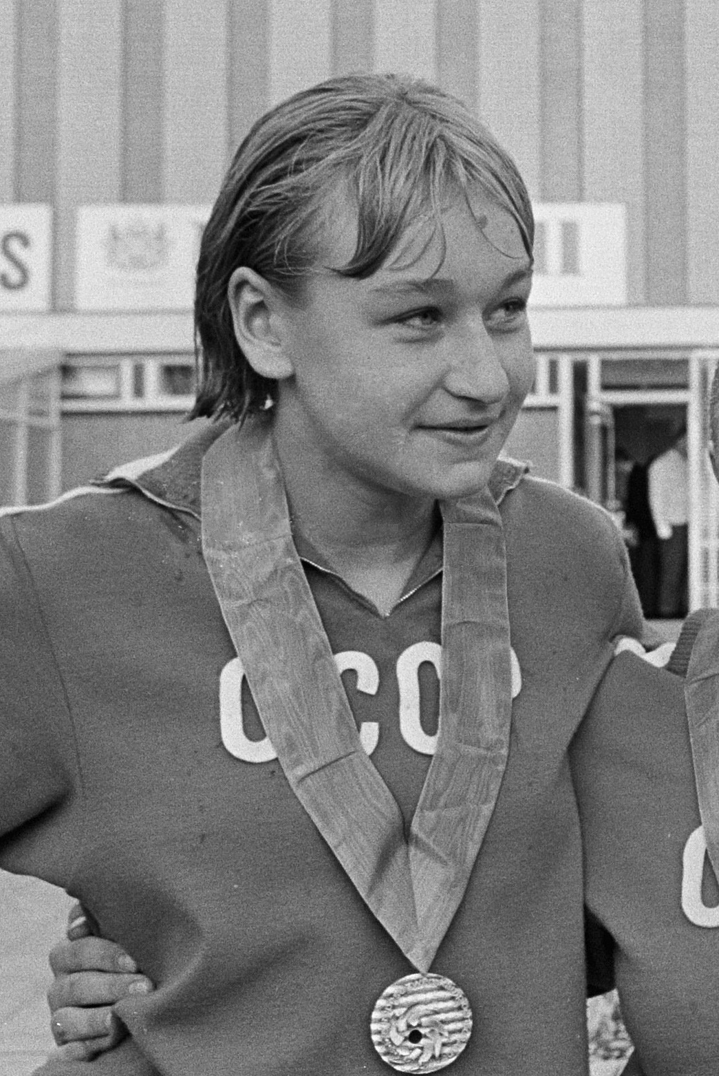 Irina Pozdnyakova; European championships, podium 200 m breaststroke